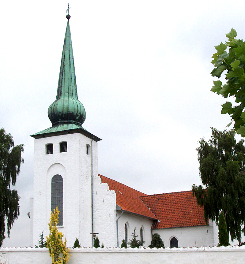 Set fra sydvest Skanderup Kirke , Skanderborg, Hjelmslev Herred, .Århus Amt (tidligere Skanderborg Amt)